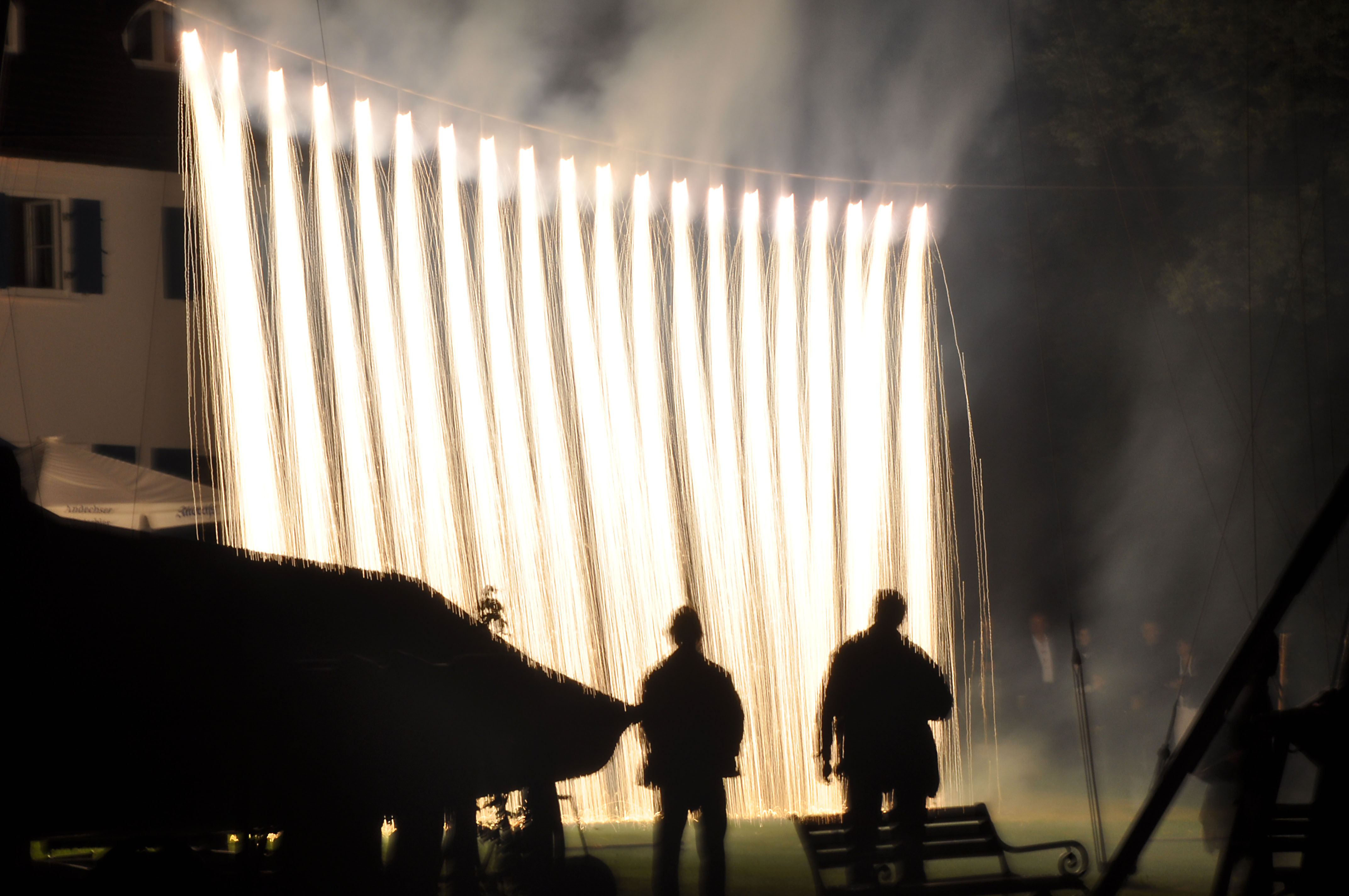 Pyrotechnischer Funkenwasserfall der Kategorie 4 mit 10m Breite, 20 Brändern und einer Brenndauer von 60 Sekunden.